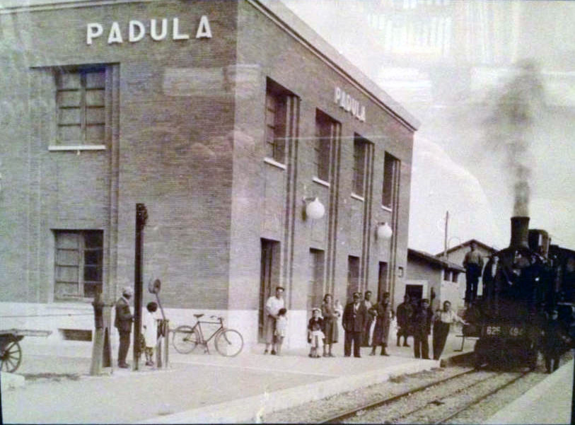 Stazione ferroviaria di Padula (anni 20/30)